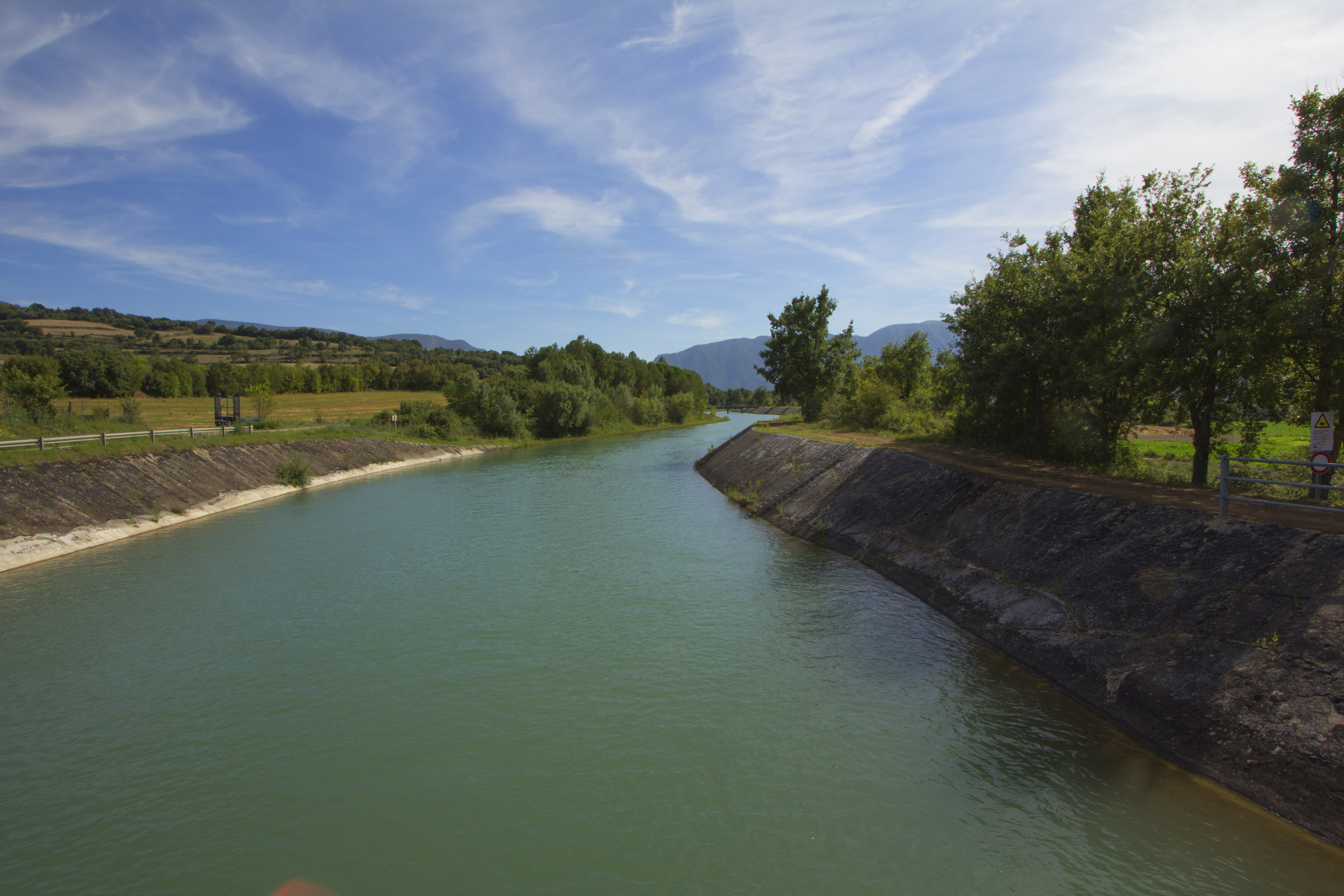 Canal de Gavet des del Pont de Farriatges, Gavet de la Conca (Pallars Jussà)